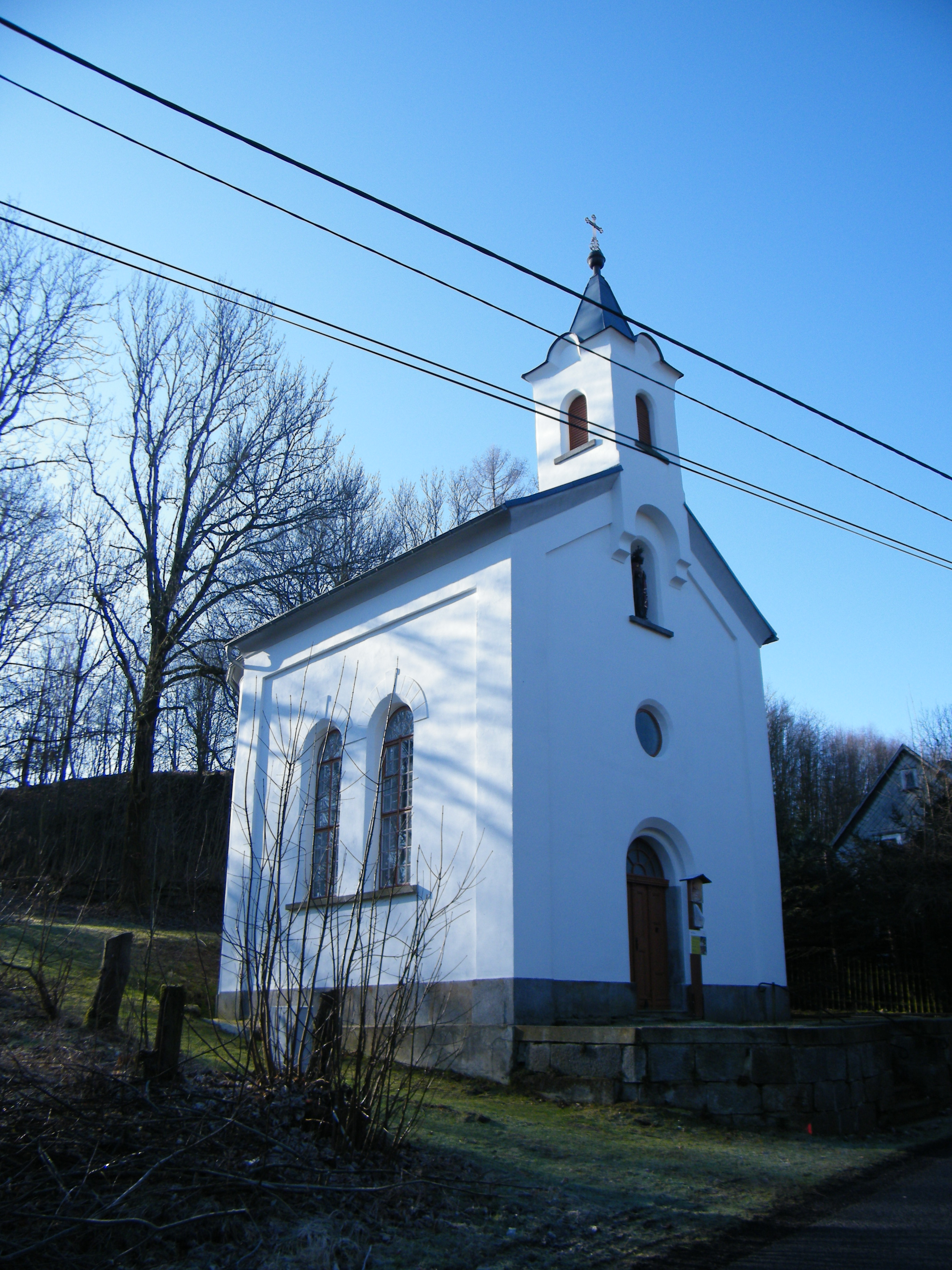 Kaple svatého Jakuba apoštola v Císařském po rekonstrukci